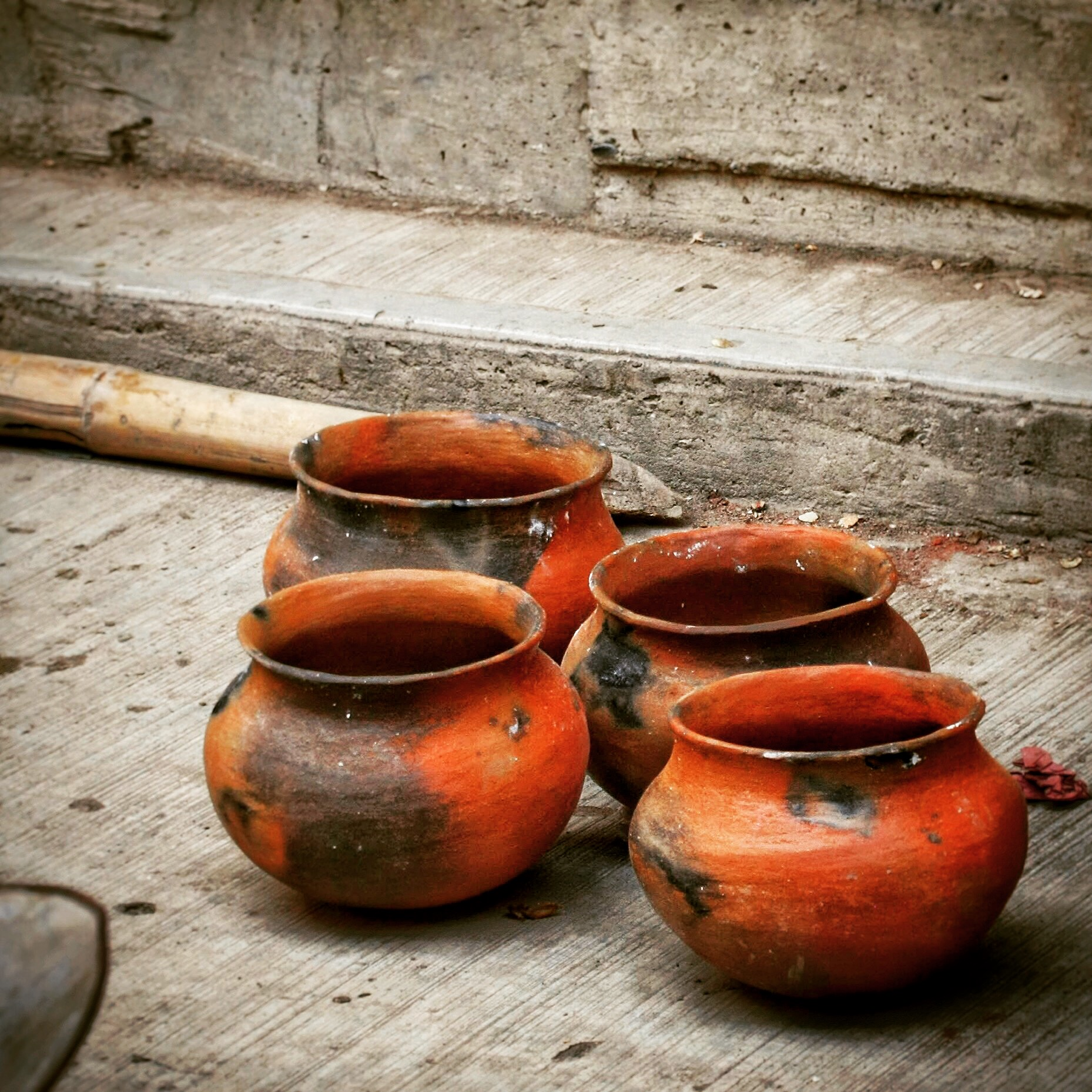 Ollas a la venta en Huejutla, Hidalgo